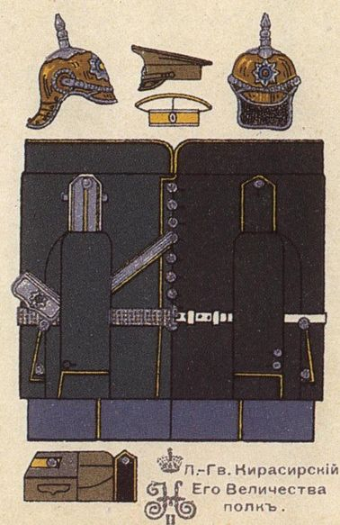 Форма обмундирования обыкновенная лейб-гвардии Кирасирского Его Величества полка. 1910 год.